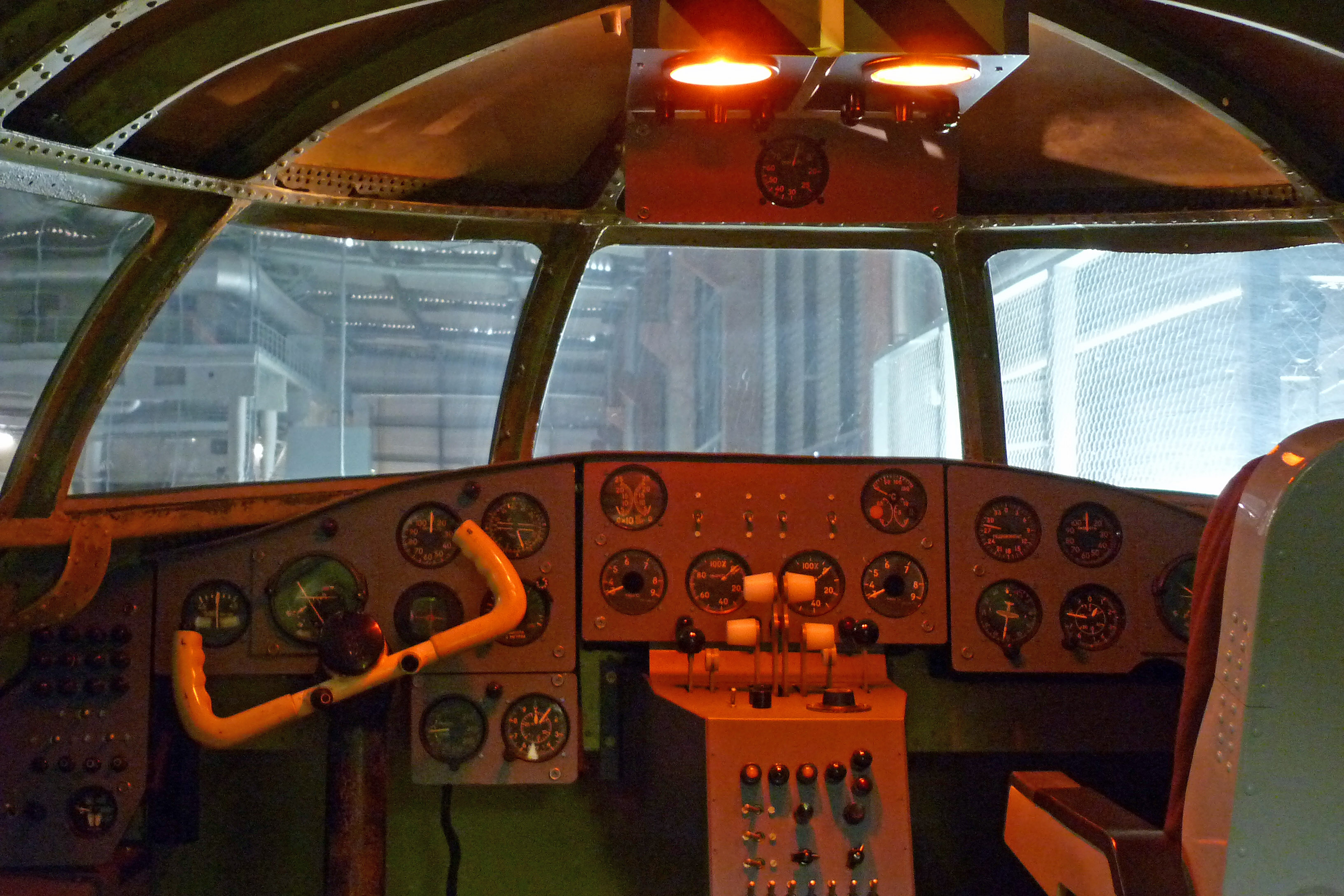 Der letzte noch vorhandene Flugzeugrumpf der "152" auf dem Flughafen in Dresden-Klotzsche, Cockpit